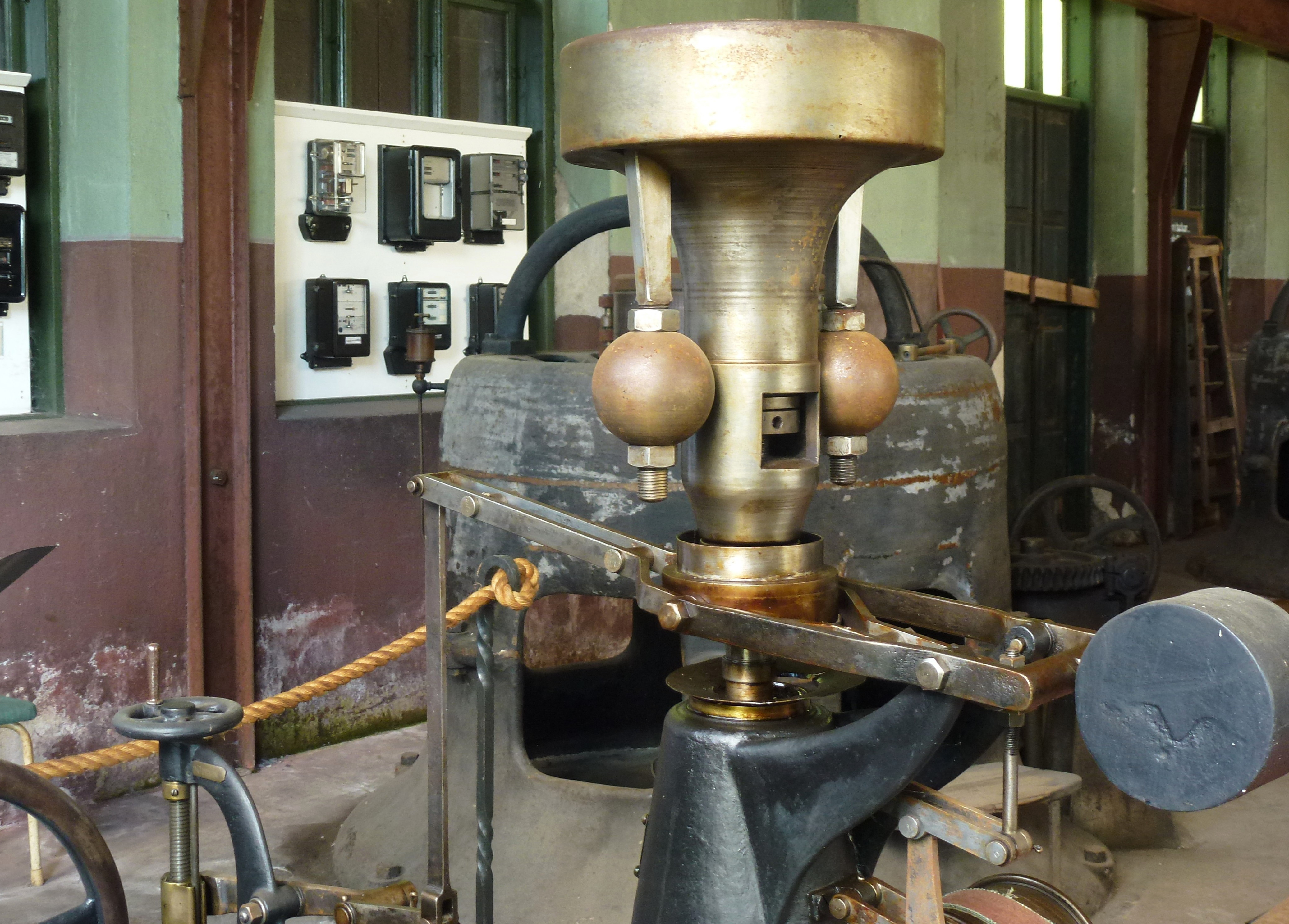 Västanfors gamla kraftstation, varvtalsregulator